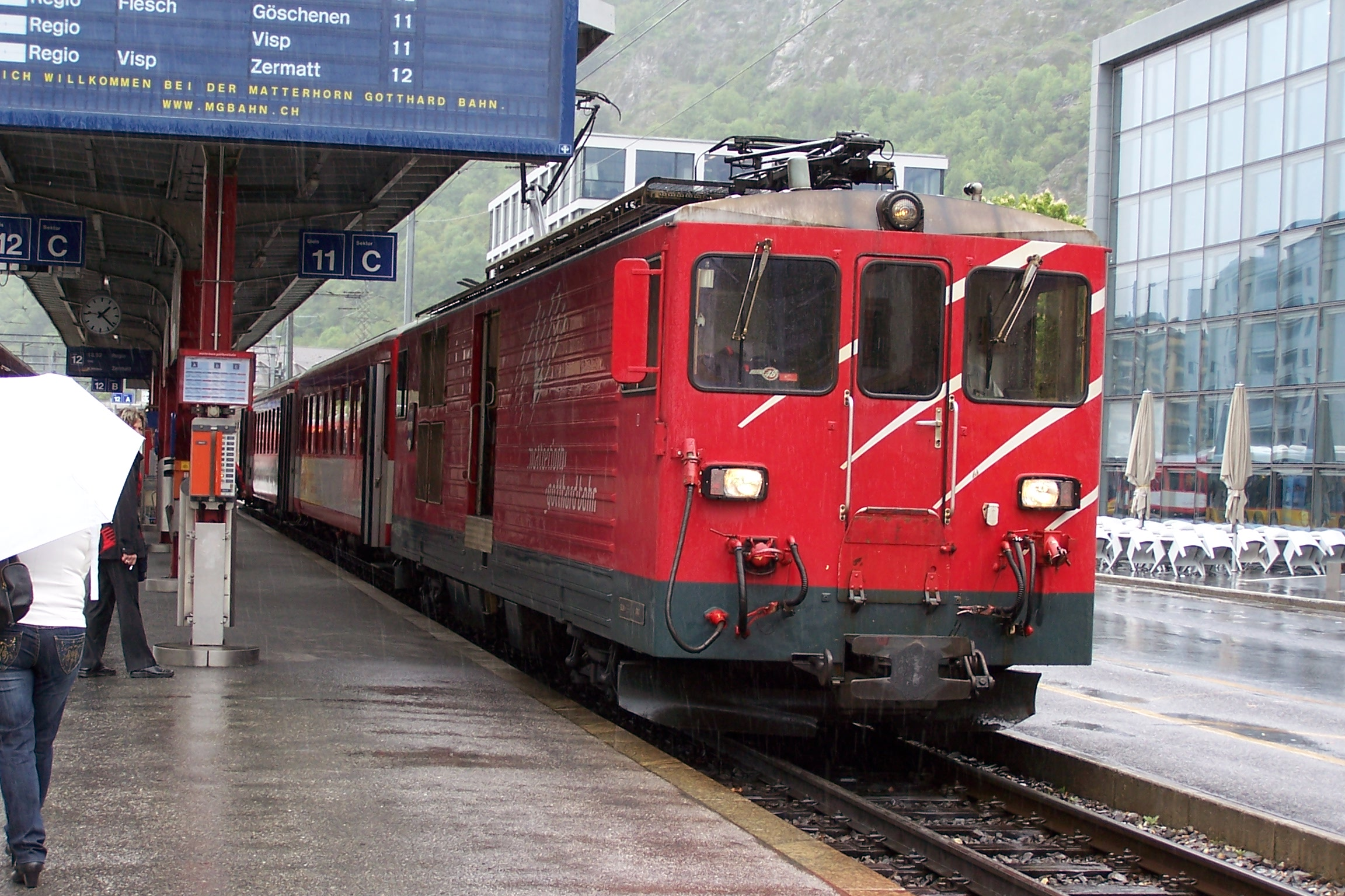 MGB Deh 4/4 Nummer 94 in Brig kurz vor der Abfahrt